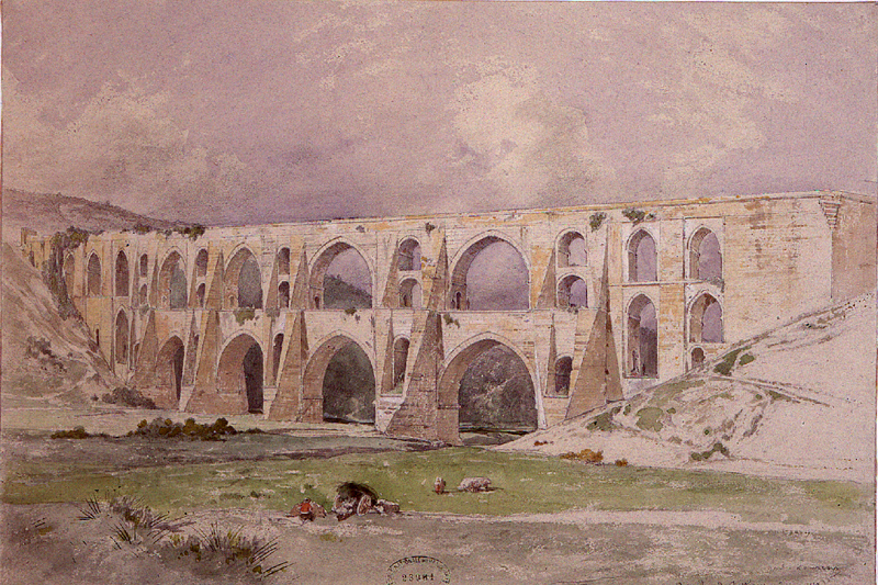 Aquädukt von Mağlova, ausgeführt von Sinan in den Jahren 1553 bis 1564, Aquarell von Jules Laurens (1847)